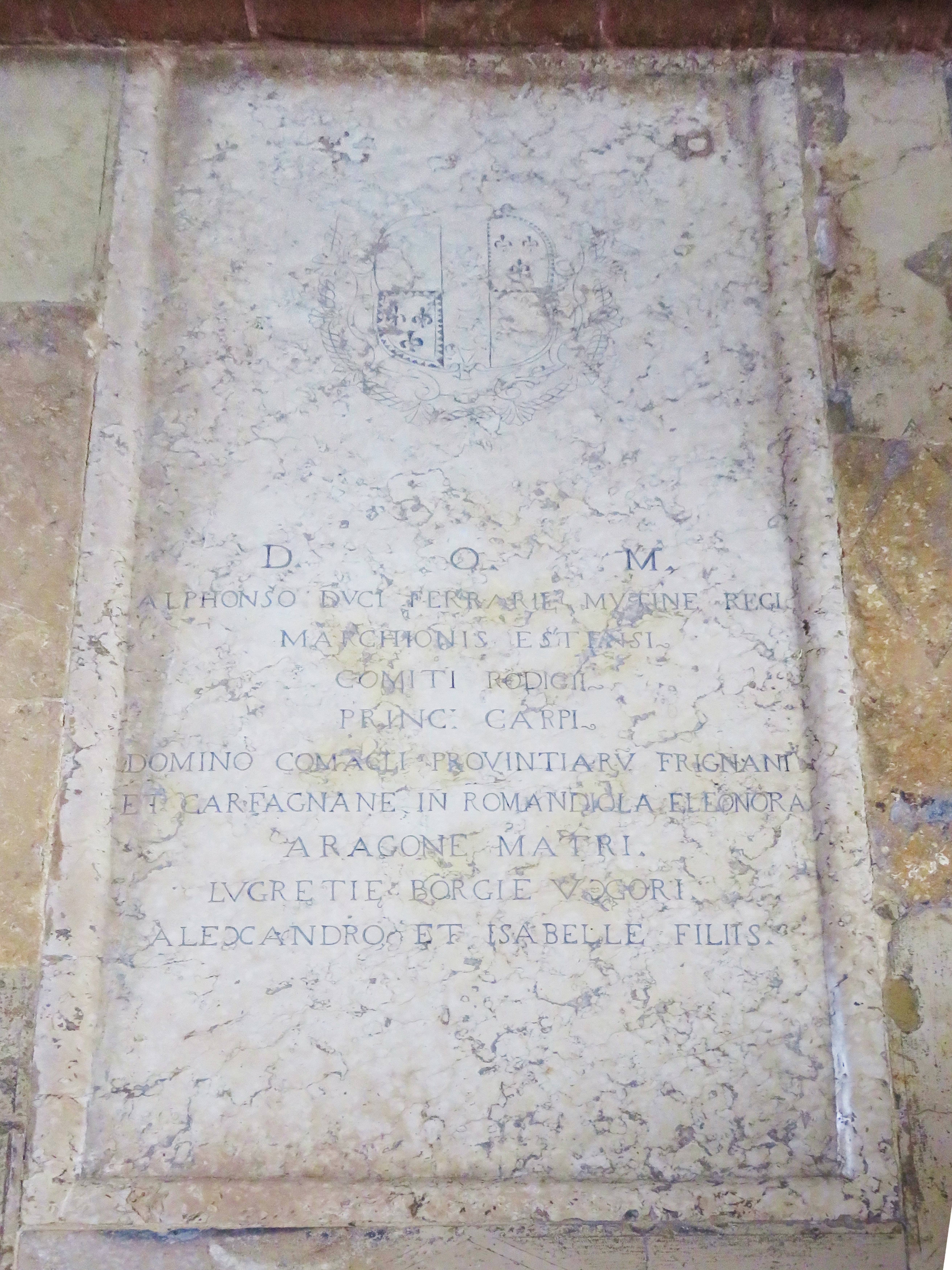 Tombe casata degli Estensi - Lucrezia Borgia, Alfonso I d'Este, Eleonora d'Aragona